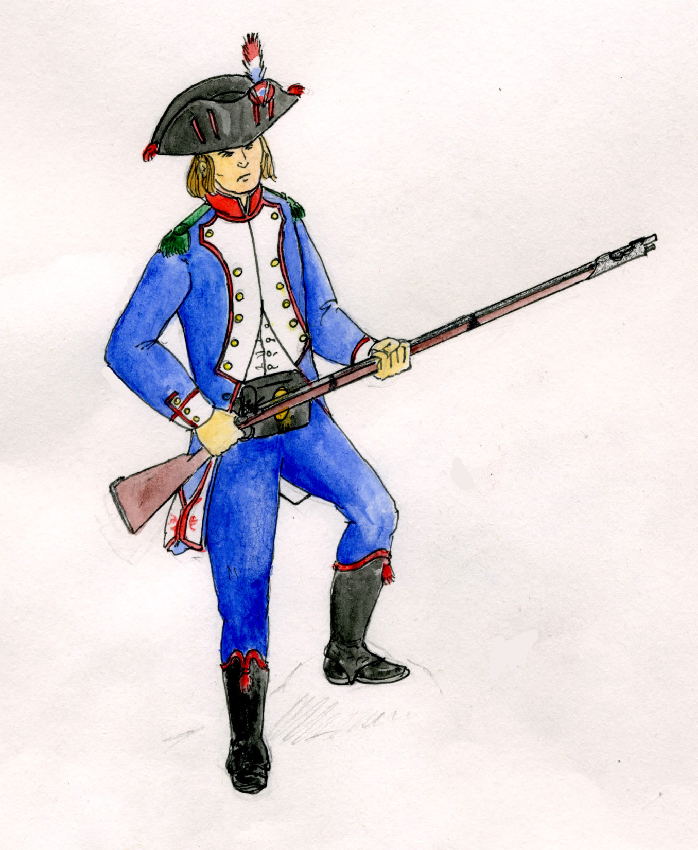 Chasseur à pied de la Garde nationale de Paris, Révolution française